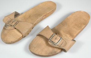 Sundhedssandaler fra 1960'erne. Et par sundhedssandaler ("vitaminski") af asketræ med læderremme med spænde over vristen. Under bunden er limet tynde såler af kunststof.